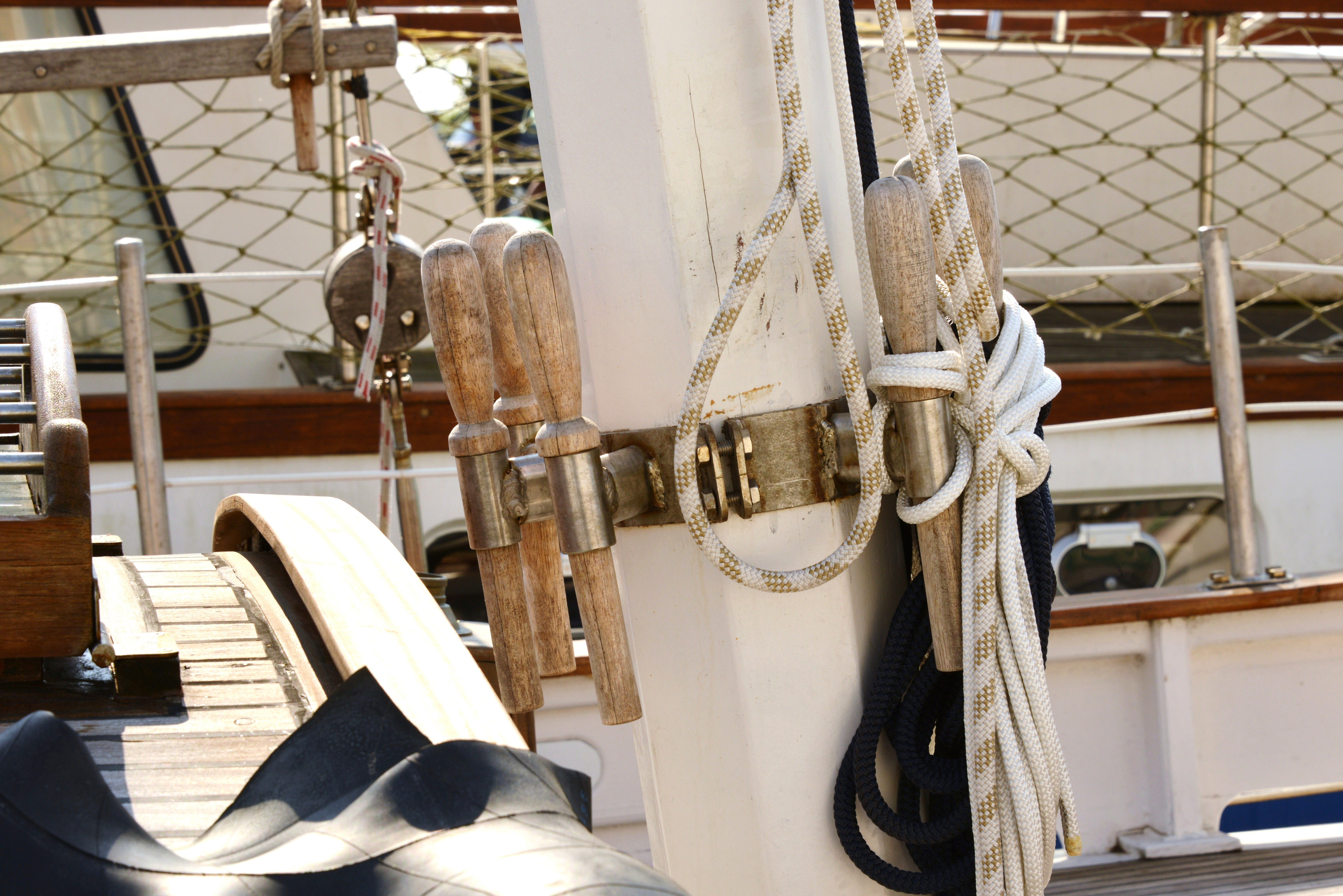 Le bas du mât de misaine est entouré d'un ratelier avec des cabillots. La goélette « Ayla » amarrée au Quai des Pêcheurs dans le port de Mortagne-sur-Gironde. Cette goélette lancée en 2003 est un Schpountz 38-40 (le n° 49). Architecte naval Daniel Z. Bombigher. Mortagne-sur-Gironde, Charente-Maritime, France.